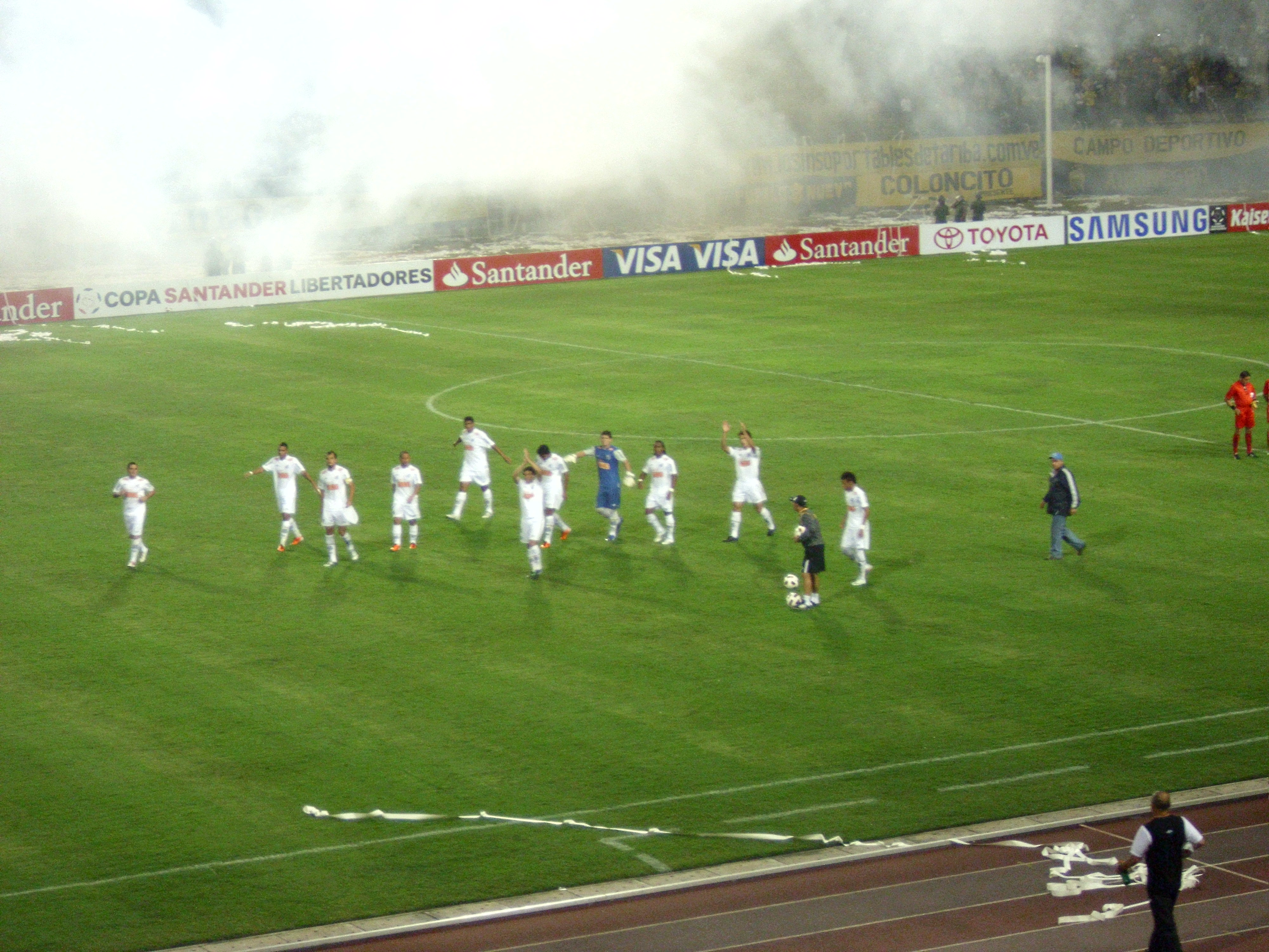 Futbolistas del Santos FC en el Estadio Polideportivo de Pueblo Nuevo en Venezuela.